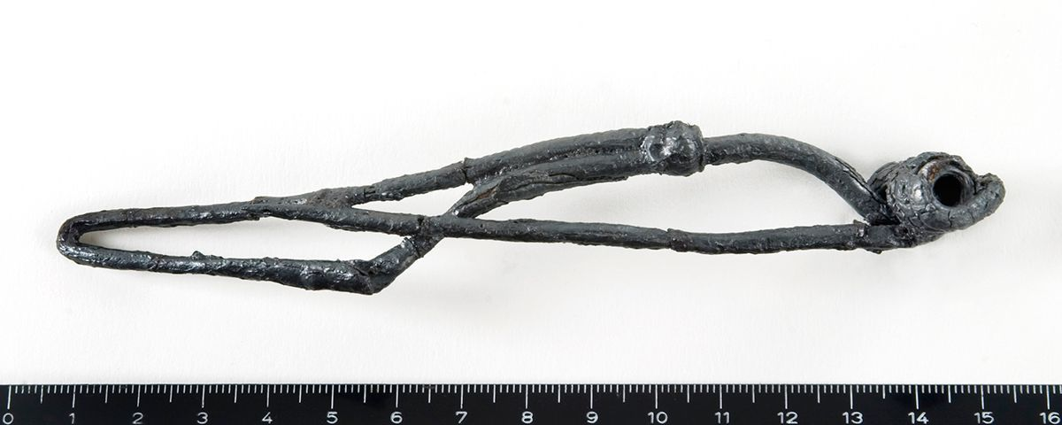 Bøylenål av jern fra førromersk jernalder. Funnet på Braaten på Ringerike i Buskerud.